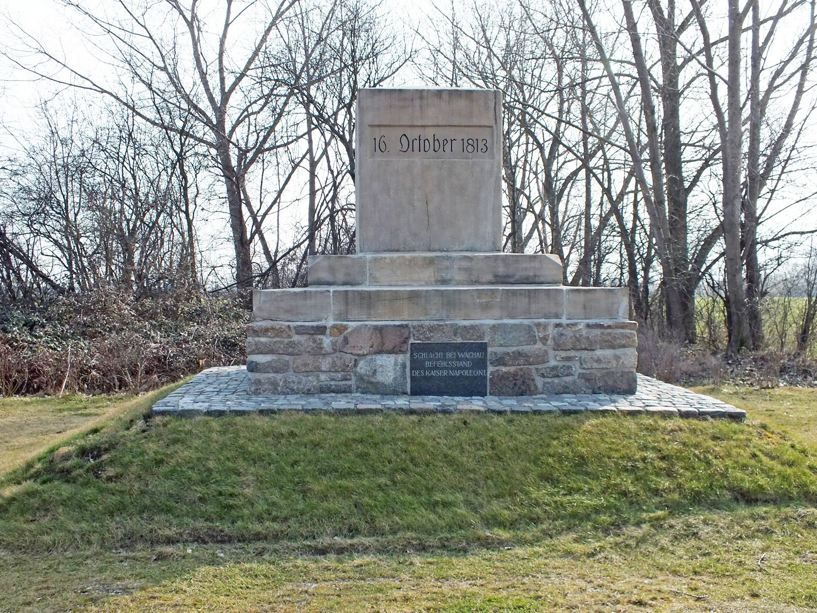 Galgenbergdenkmal bei Leipzig-Liebertwolkwitz in Erinnerung an die Völkerschlacht